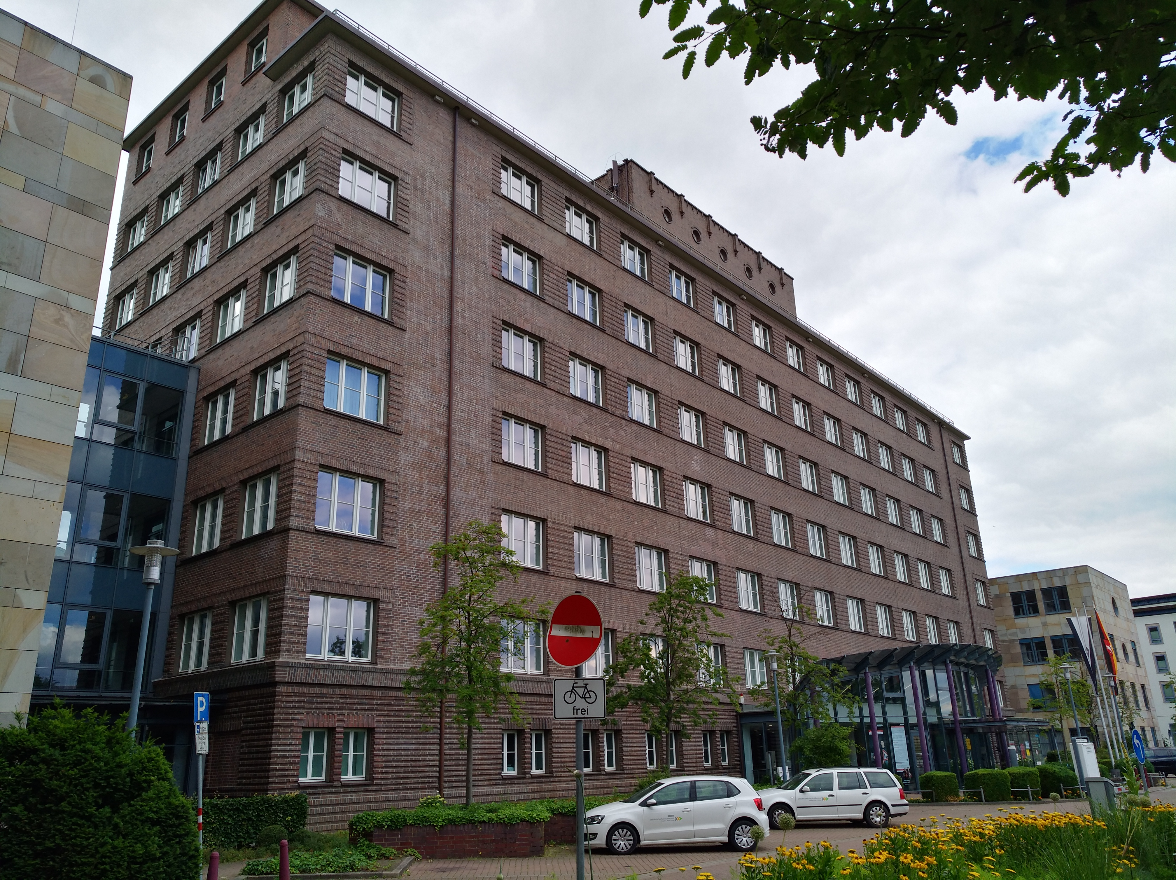 Vorderseite des Stadthauses 1 in Osnabrück, ehem. Stadtkrankenhaus